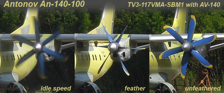 Двигатель ТВ3-117ВМА-СБМ1 с винтом АВ-140 на самолёте Ан-140. 1 — малый газ, 2 — флюгерное положение, 3 — расфлюгированное положение.